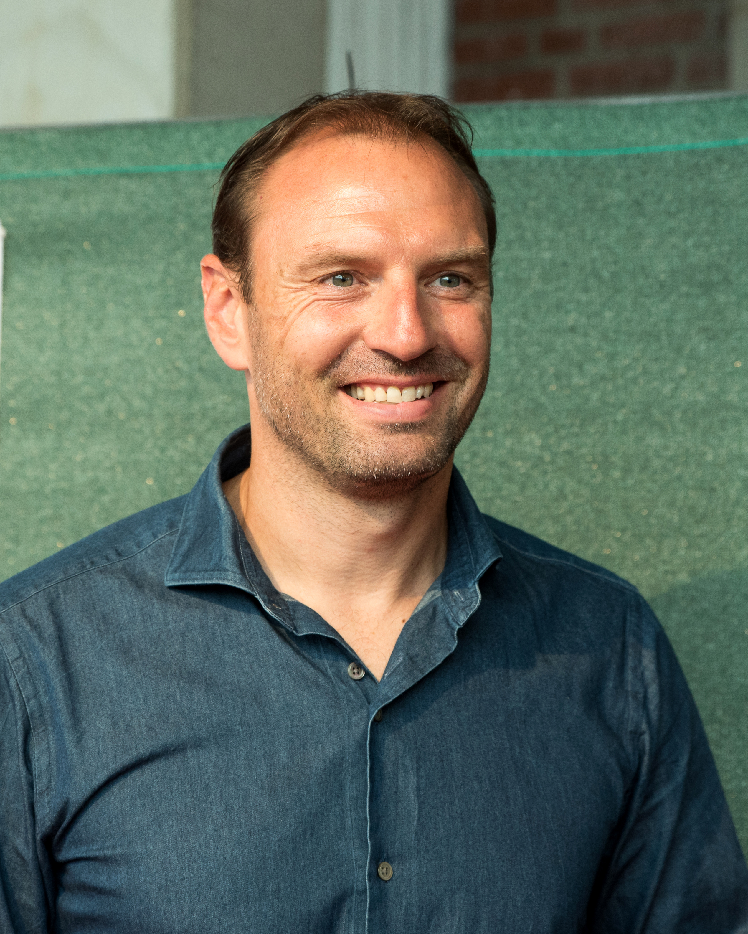 Jens Nowotny beim Tag der Legenden 2016